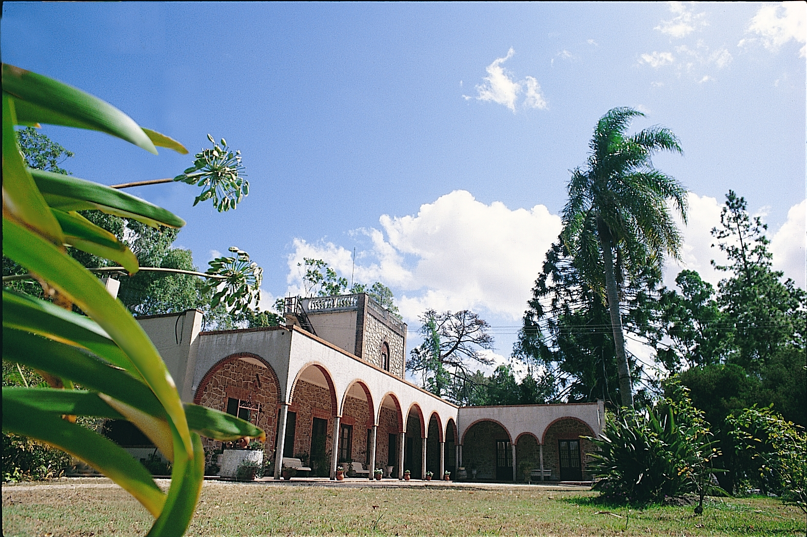 Casona Antigua